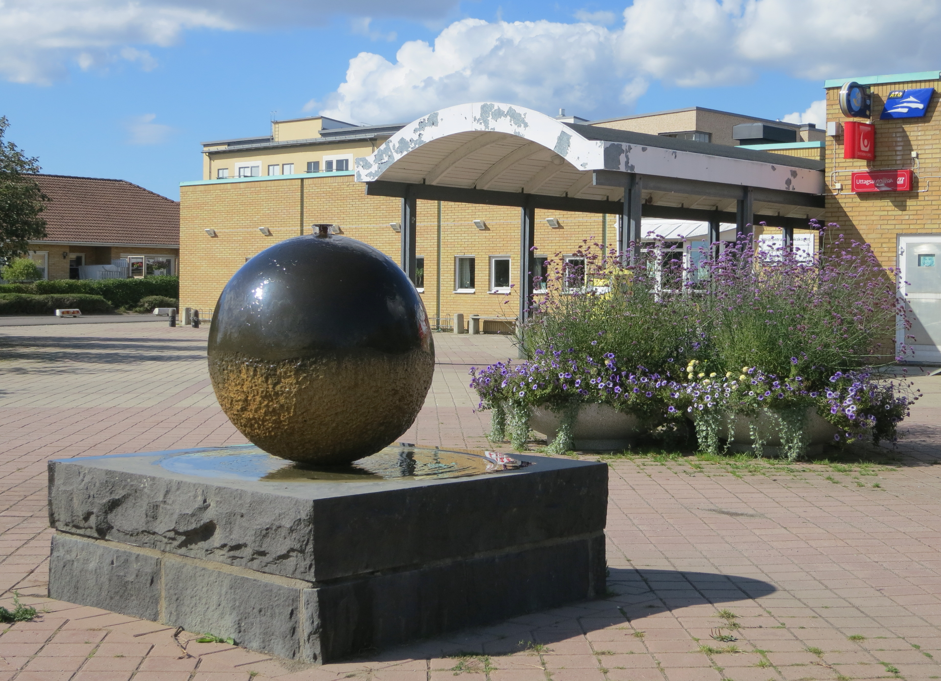 Bara centrum i Bara i Svedala kommun